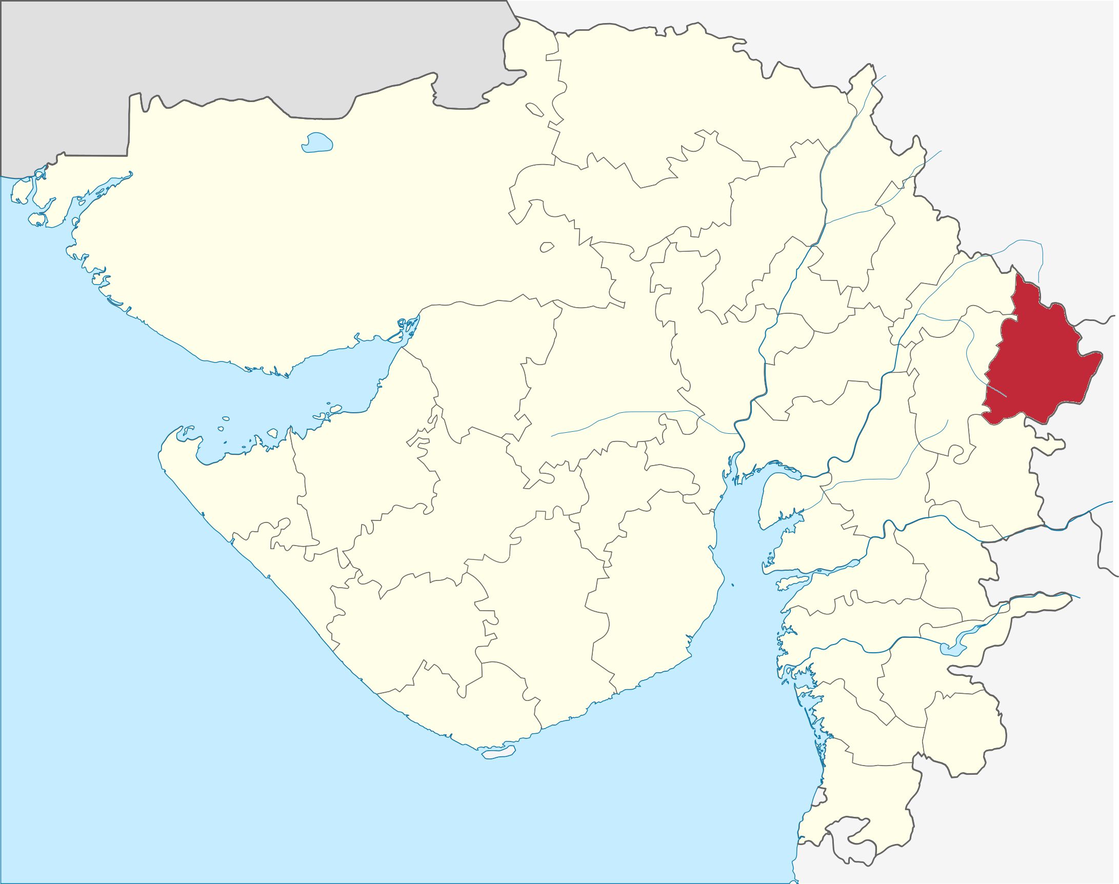 Distrito de Dahod en Gujarat